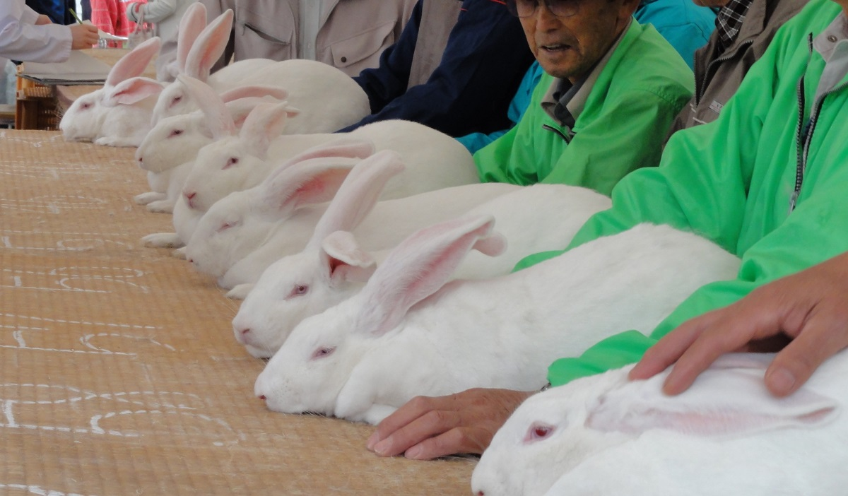 全国ジャンボうさぎフェスティバル 品評会の様子